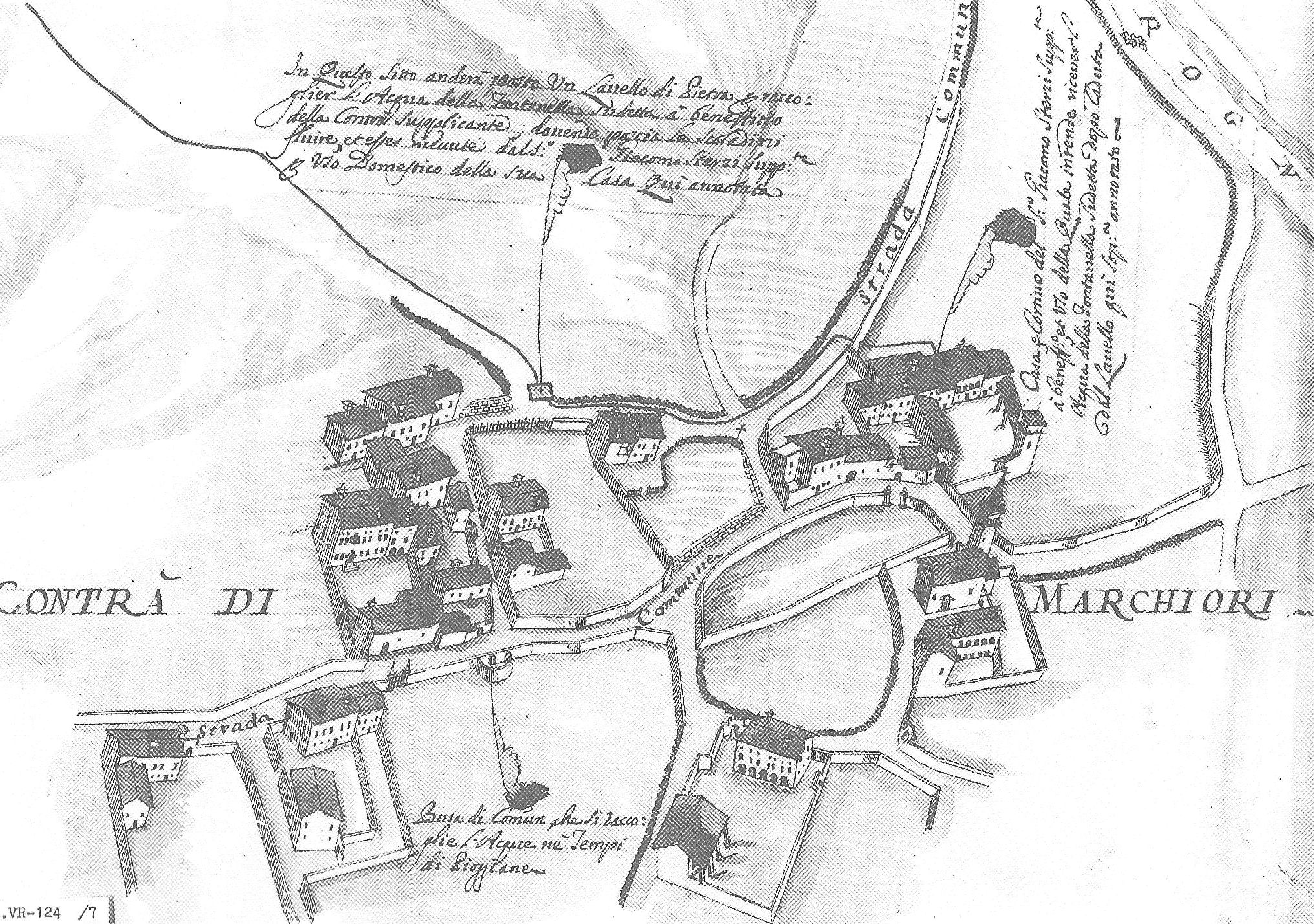 Mappa di Fumane (provincia di Verona) risalente al 1710. Conservata nell'Archivio di Stato di Venezia.